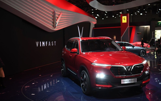 Được chụp tại cửa hàng. Do tập đoàn Vin sản xuất.